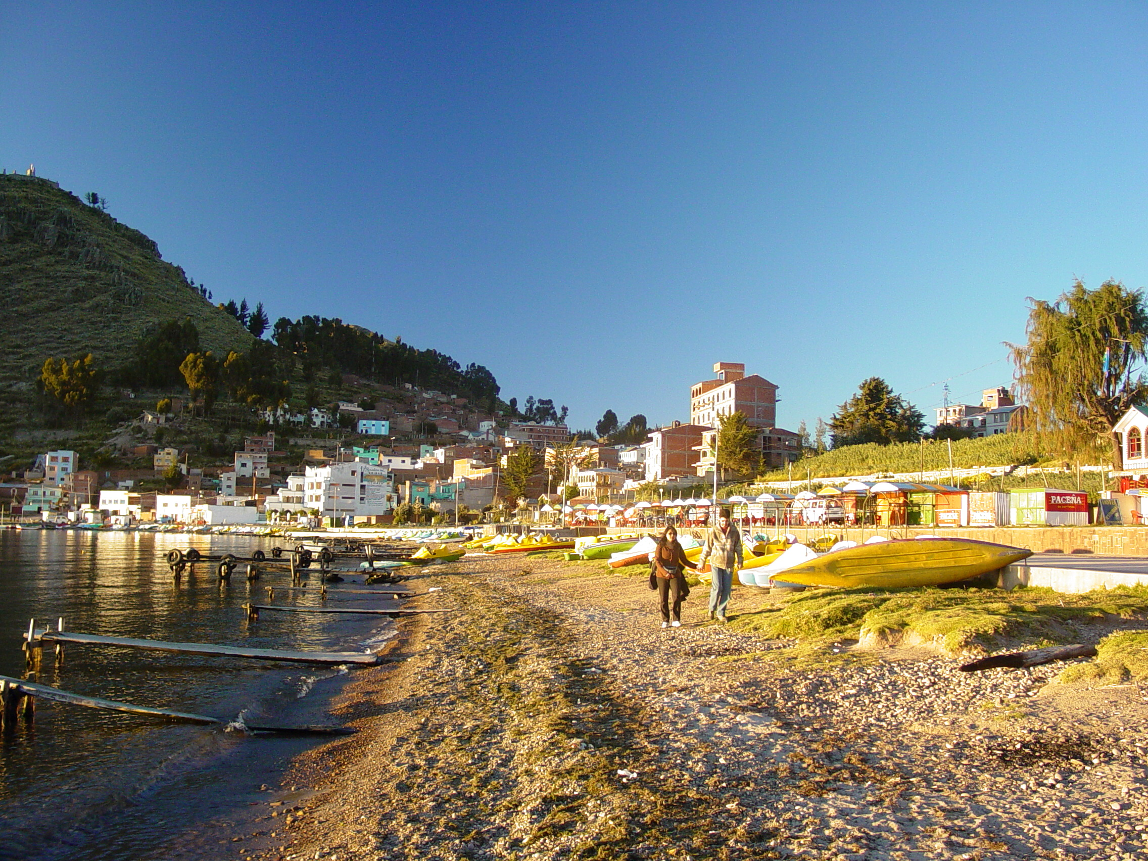 Copacabana, Bolivia